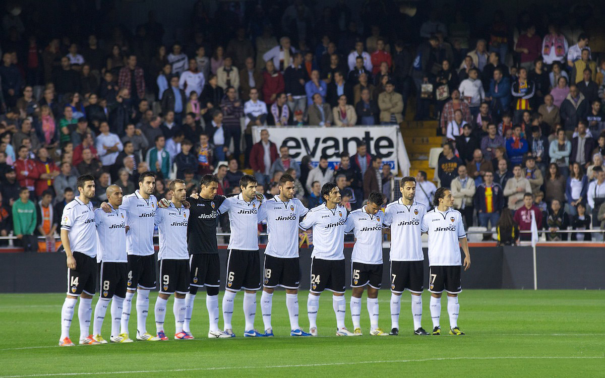 Valencia-CF vs Español 2012, 17.11.2012.